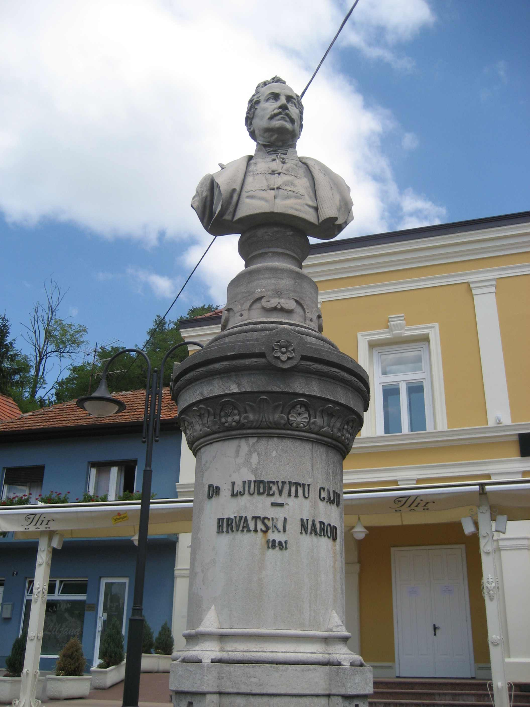 Ljudevit Gaj